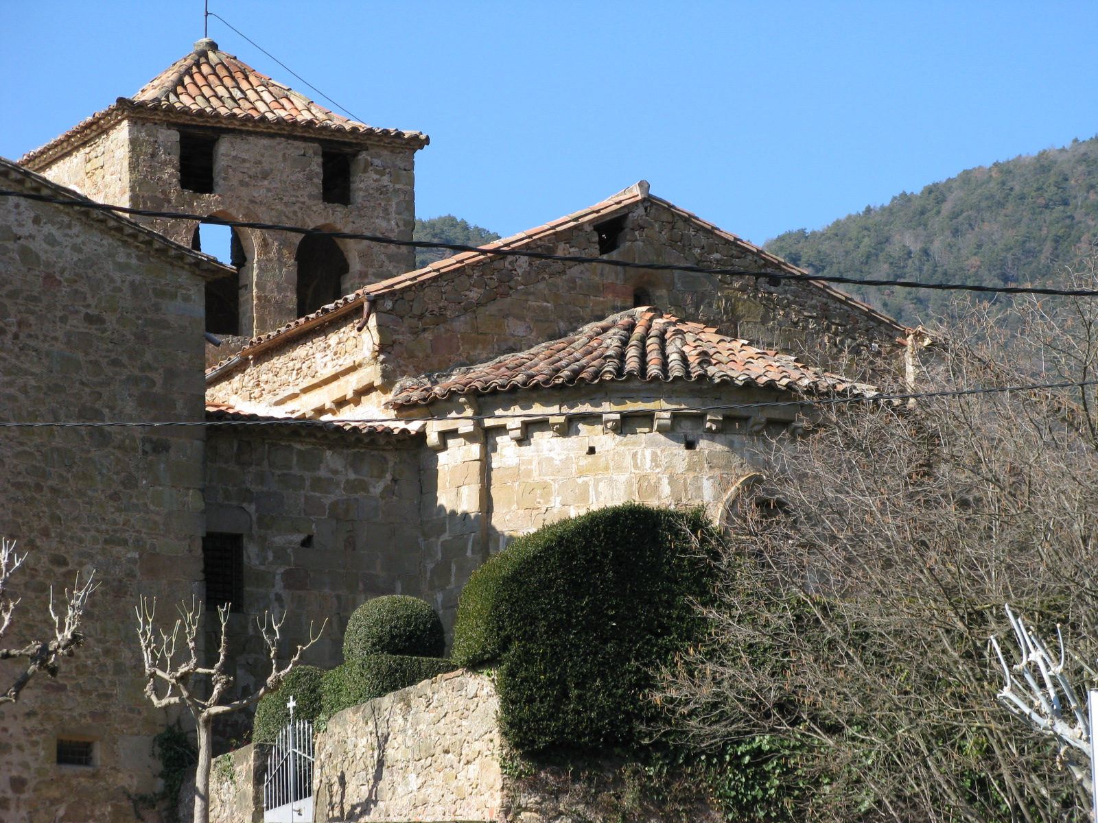 Sant Salvador de Bianya (Church Romanesque, Val de Bianya, Catalunya, Spain)